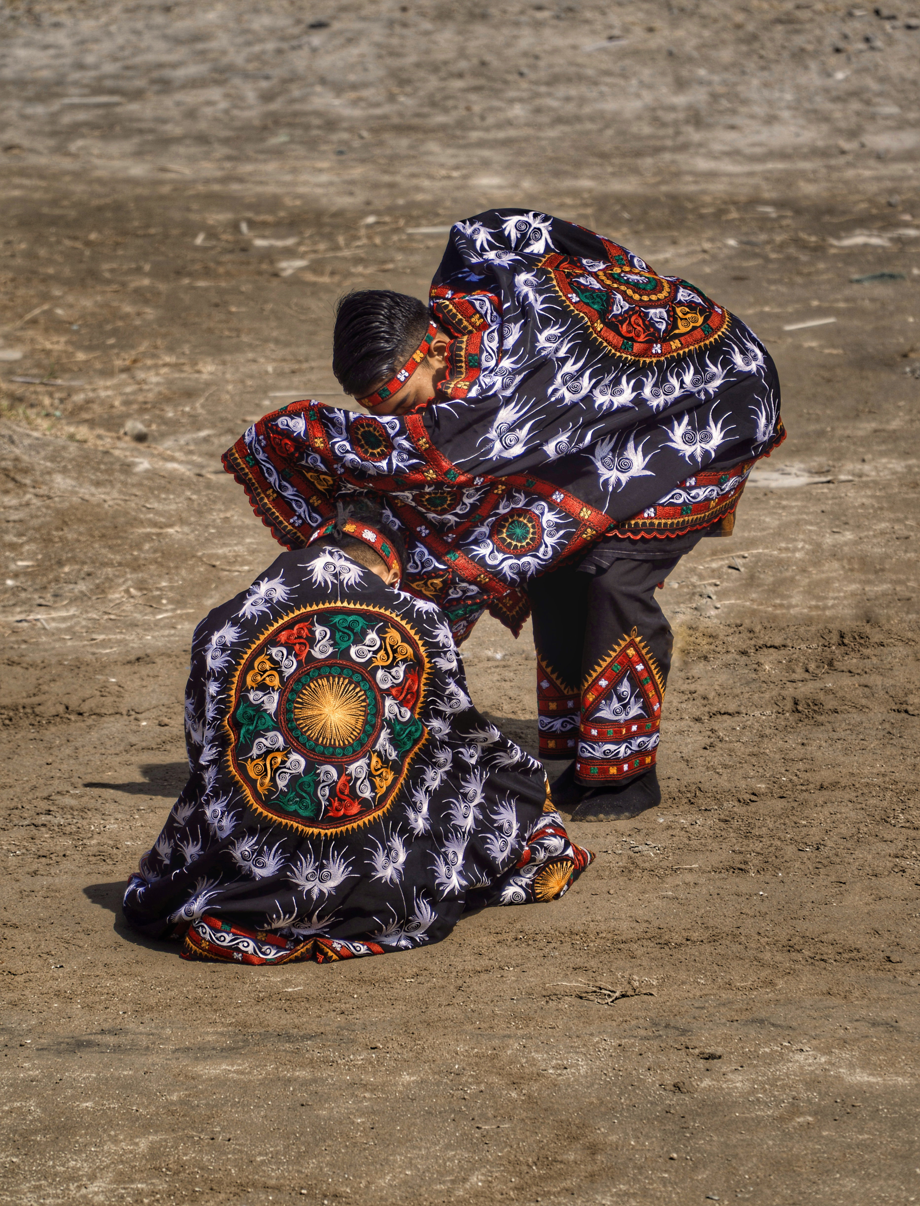 Tari guel adalah salah satu khasanah budaya Gayo di Aceh. Guel berarti membunyikan. namun Guel menjadi tari tradisi terutama dalam upacara adat tertentu.